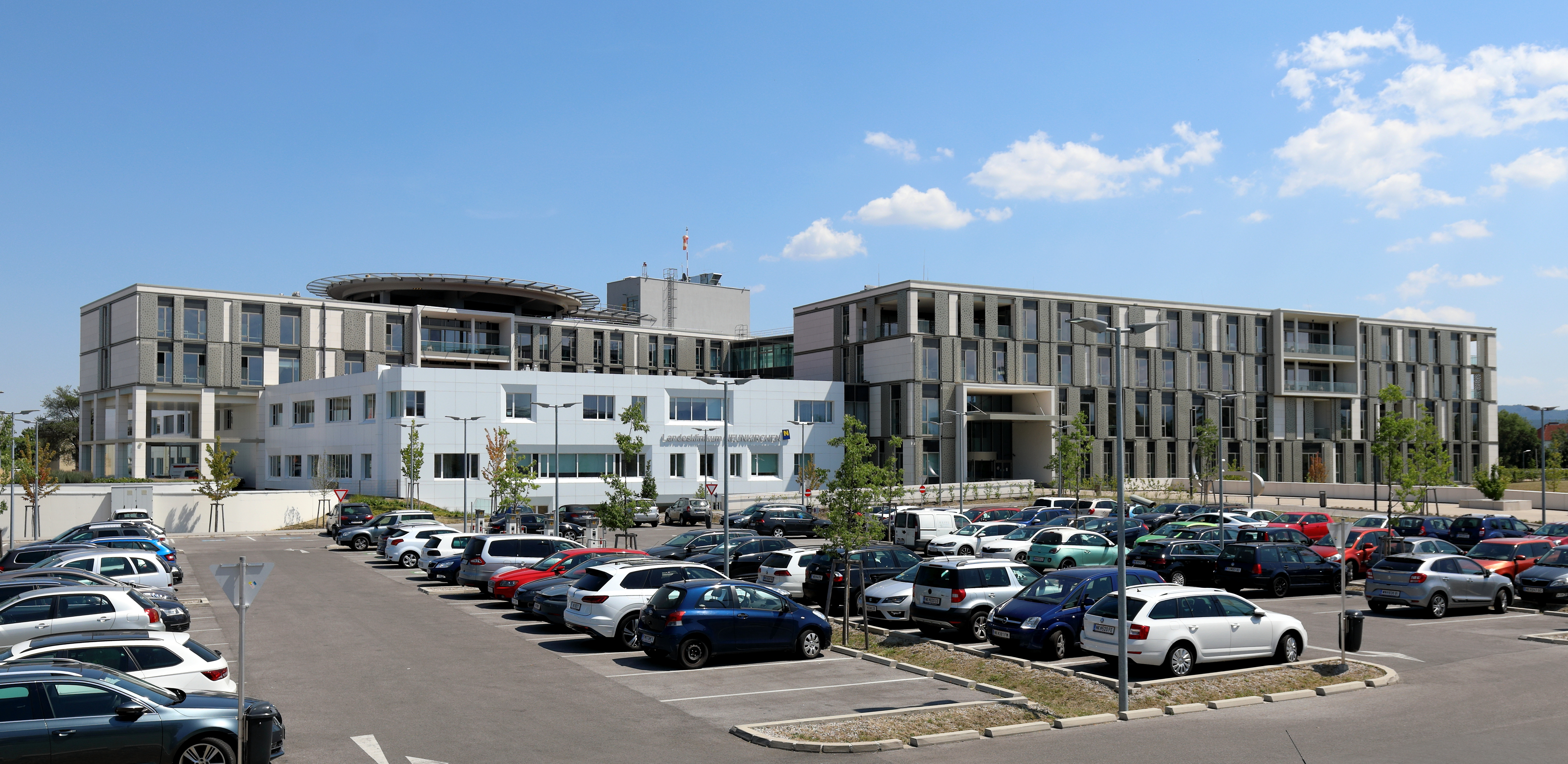 Nordwestansicht des Landesklinikum der Niederösterreichischen Landeskliniken-Holding in der niederösterreichischen Stadt Neunkirchen.Das mit einem Kostenaufwand von rund 160 Mio. Euro errichtete Krankenhaus (367 Betten, fünf Operationssäle) wurde nach einer Bauzeit von rund 2,5 Jahren (Grundsteinlegung 2013) am 3. November 2015 eröffnet. In einer 2. Bauphase erfolgte 2016 der Abriss der alten Gebäude und die Errichtung der Außenanlagen.